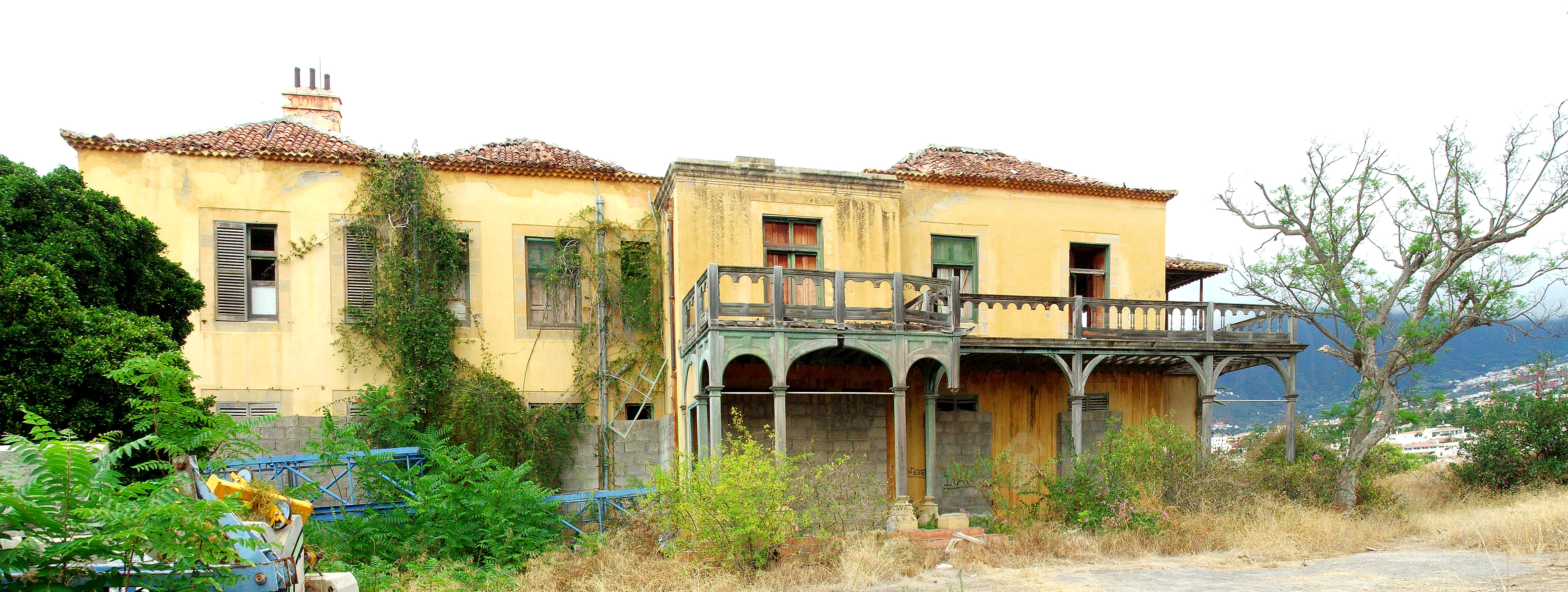 Casa San Fernando Bien de interés cultural